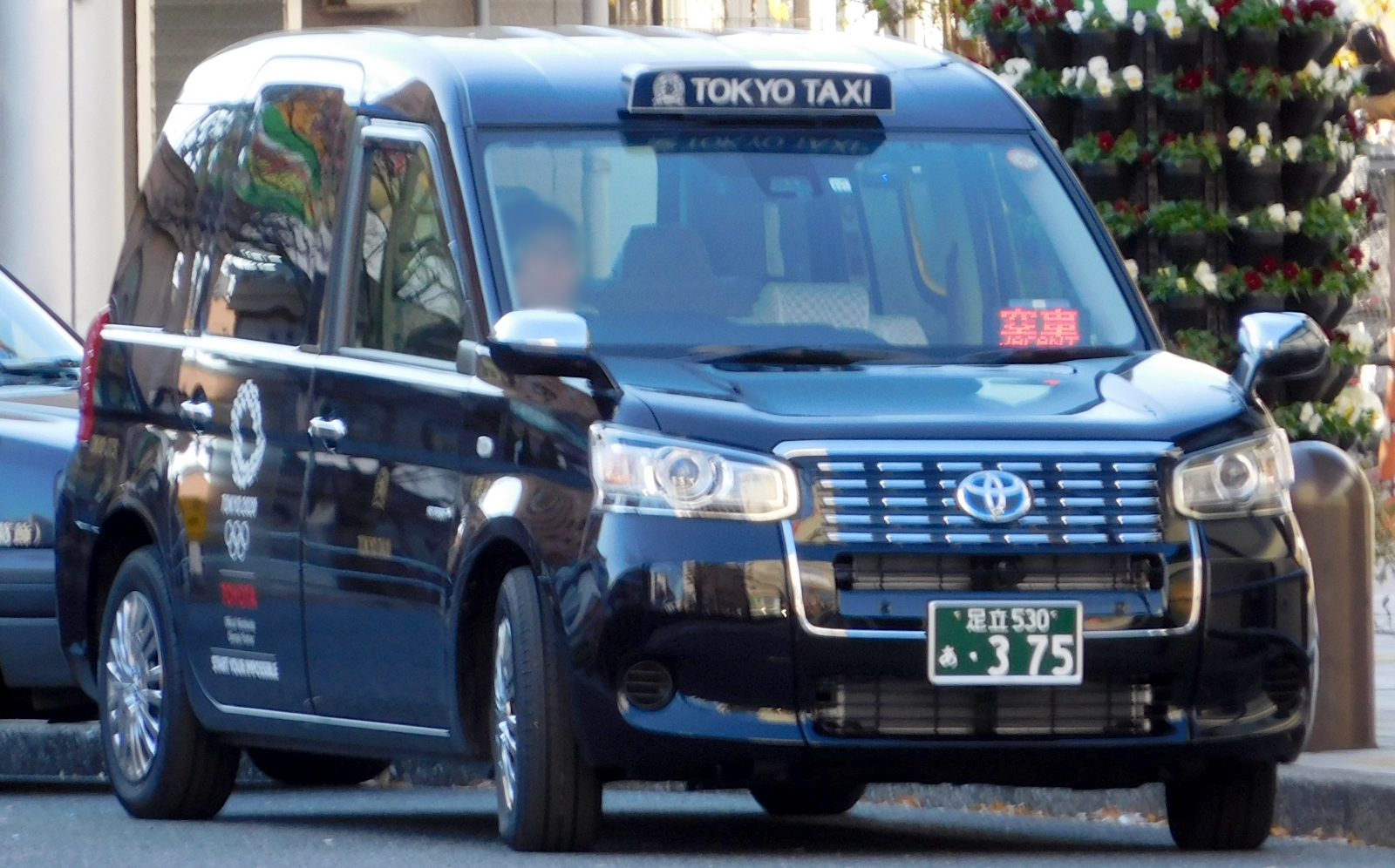 東京タクシーのジャパンタクシー